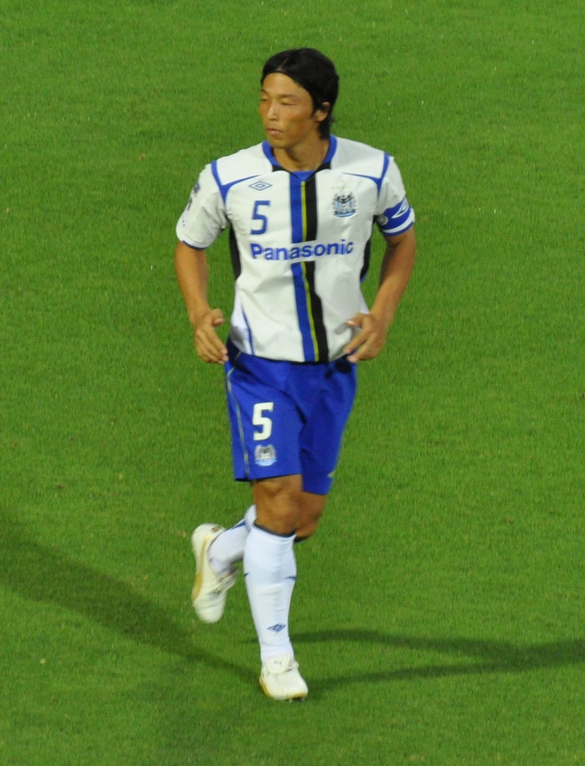 Satoshi Yamaguchi cropped from, 2011.07.10 Omiya Ardija 2-3 Gamba Osaka_105